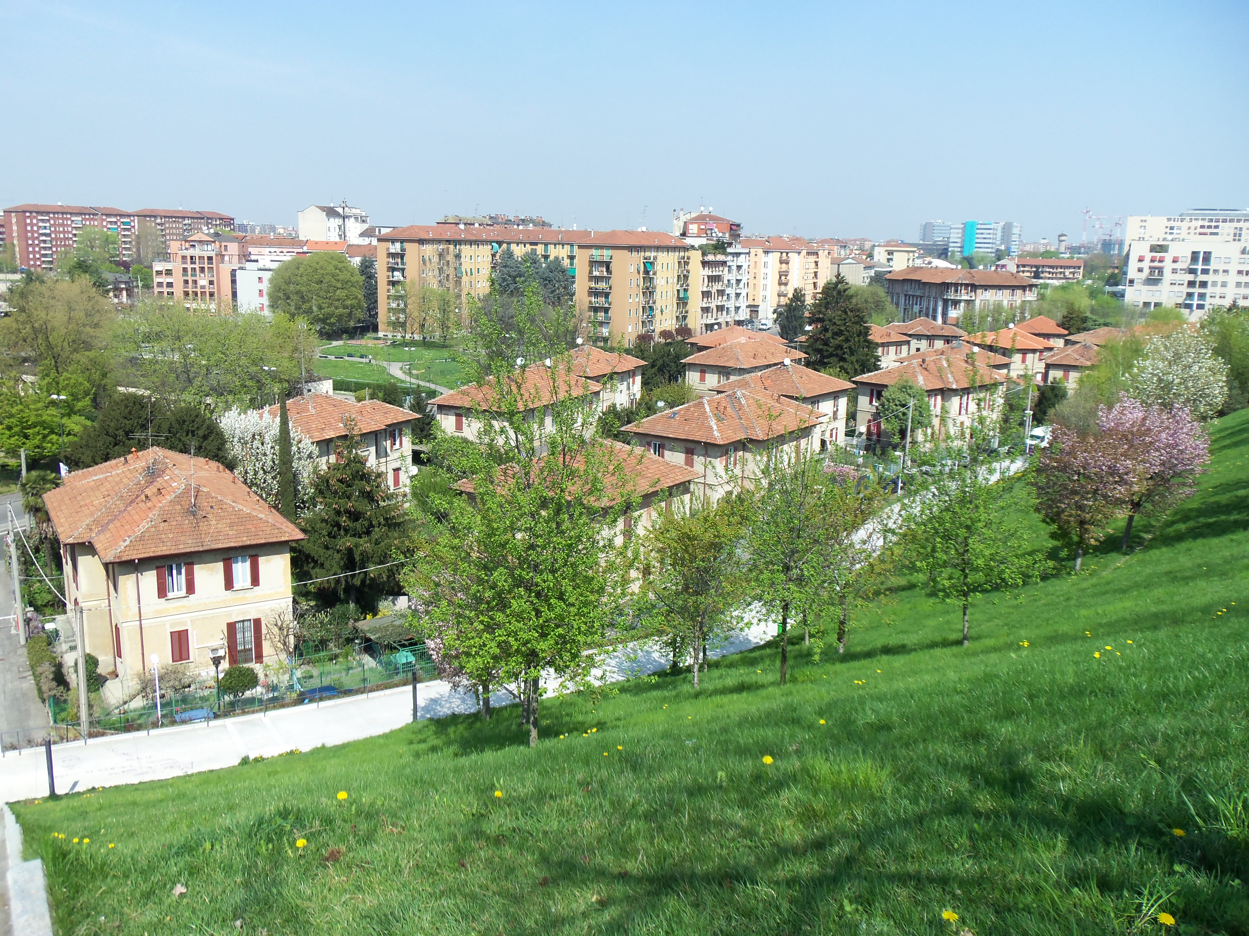 Milano, il villaggio operaio Borgo Pirelli visto dalla Collina dei Ciliegi